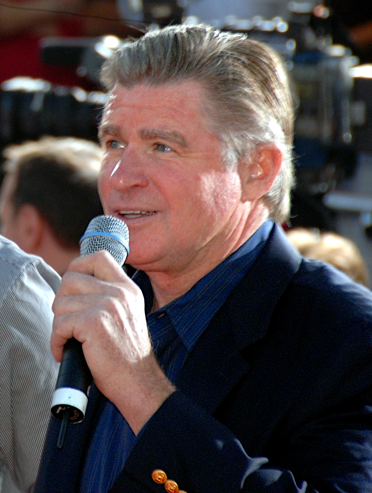 Treat Williams an der Premiere von "Love Vegas".